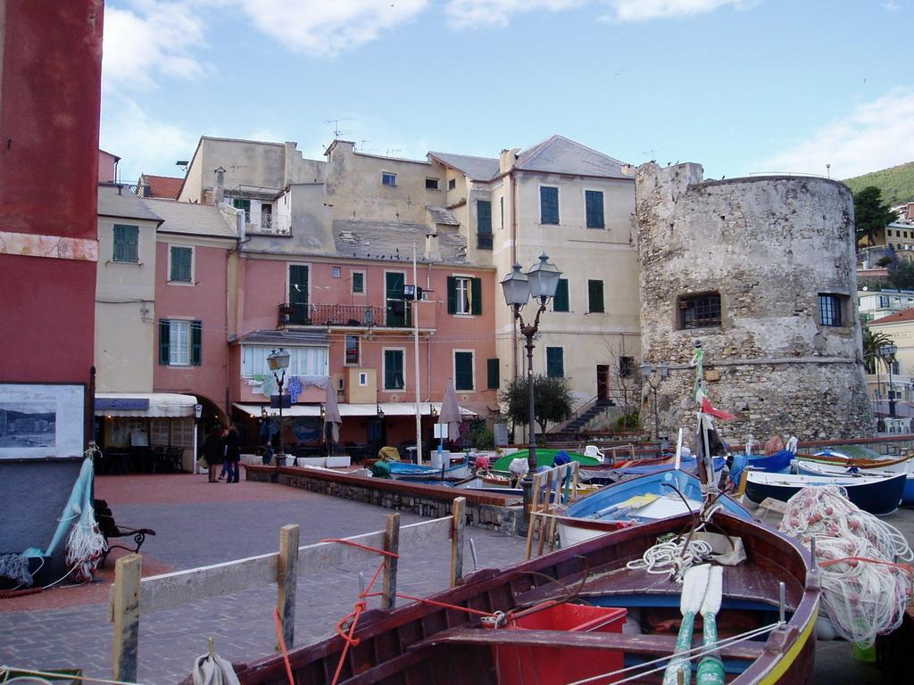 Scorcio di Laigueglia, Liguria, Italia